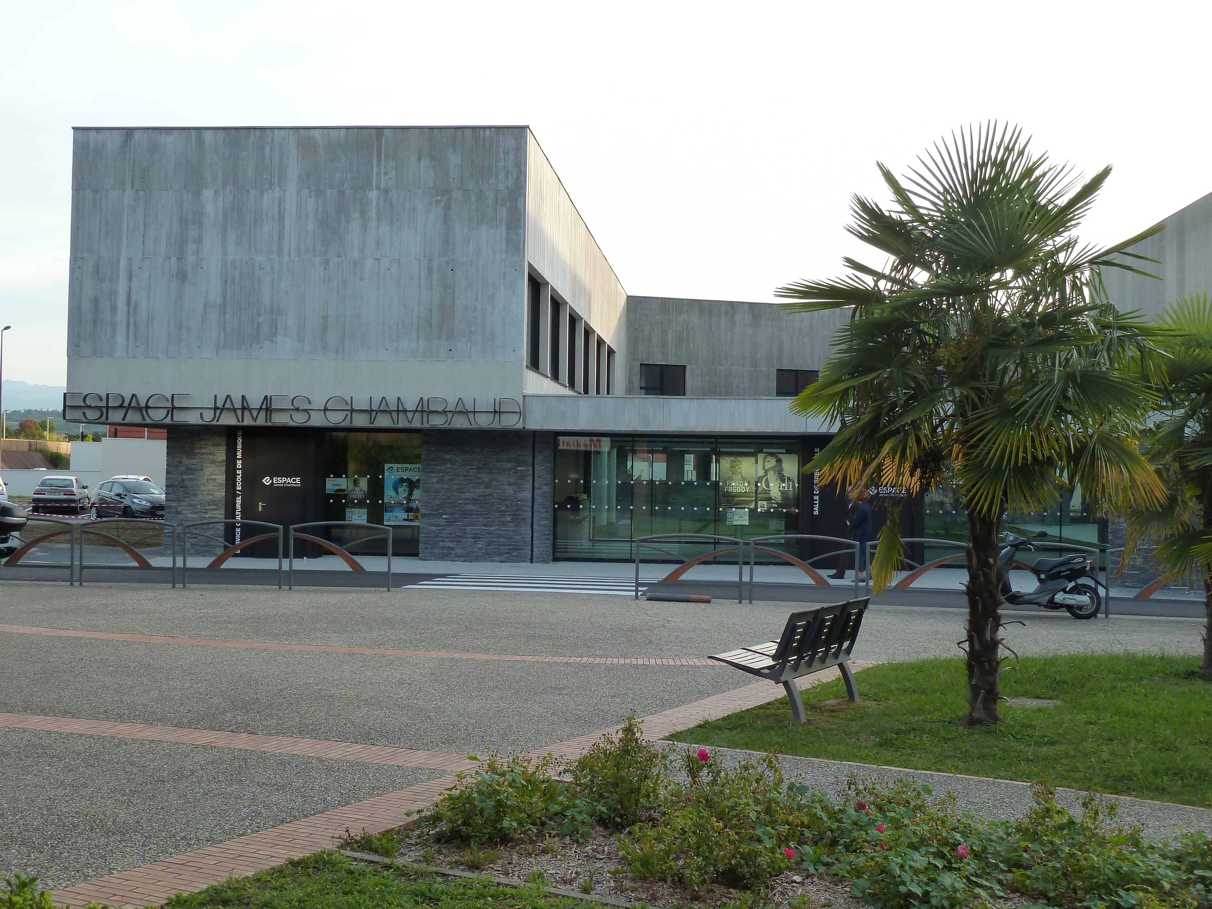 L'Espace James Chambaud est composé d'une salle de spectacle de 300 à 750 places et d'une école municipale de musique. Il abrite également le service culturel de la mairie de Lons.